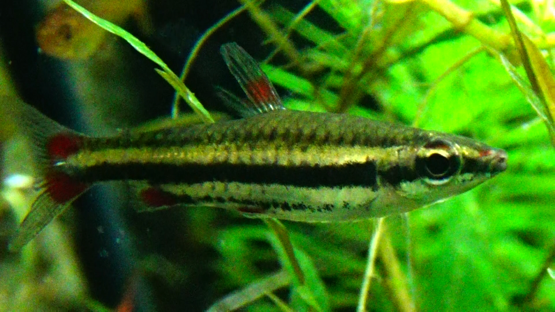 Nannostomus nigrotaeniatus - Aquarium tropicale du palais de la porte dorée Paris/France - 06/09/2015